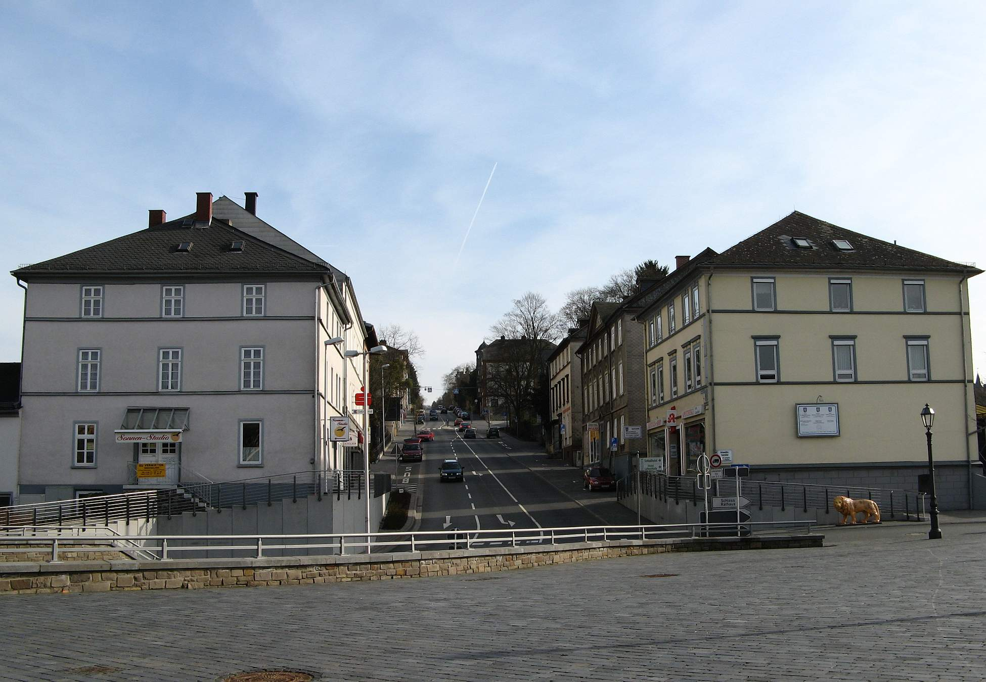 Frankfurter Straße in Weilburg vom König-Konrad-Platz aus gesehen